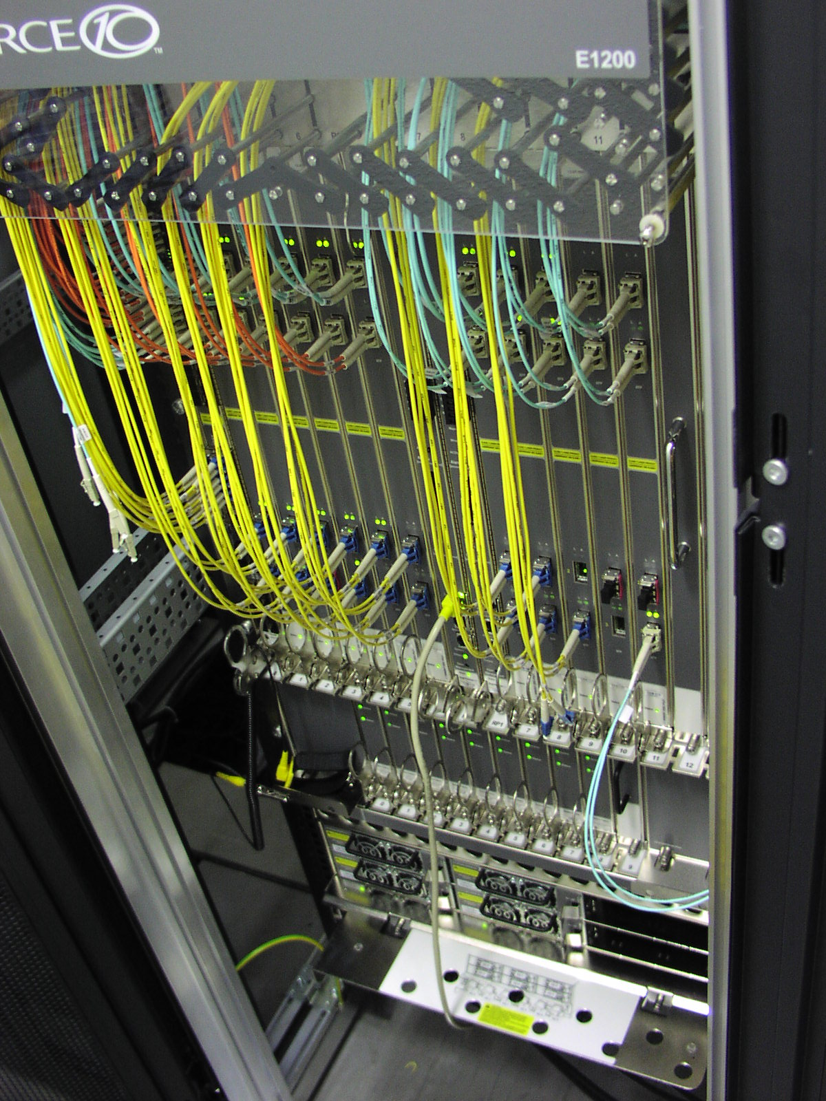 A BIX egyik új Force10 switch-e a háromból, melyek a Cisco 6500-asokat váltják le 2009 május-júniusában